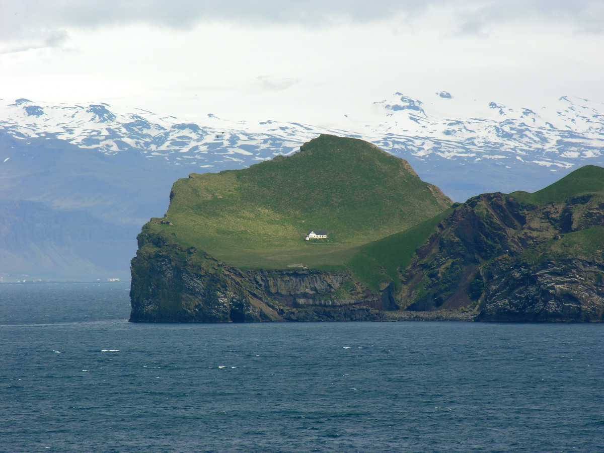 Vestmannaeyjar, Iceland